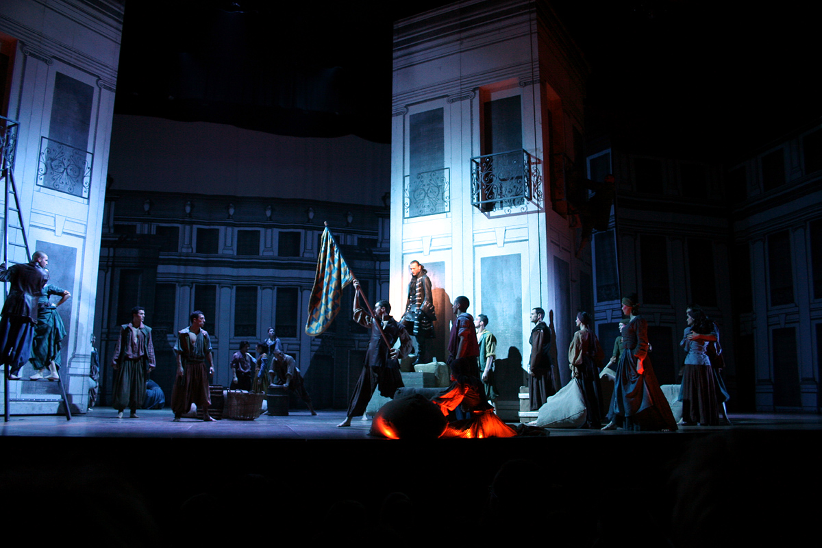 Le Roi Soleil, Musical show in Paris (Palais des Sports), France